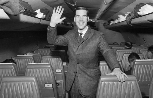 Urheilutoimittaja Anssi Kukkonen lentokoneessa lähdössä Squaw Valleyn talvikisoihin (vuosi 1960).